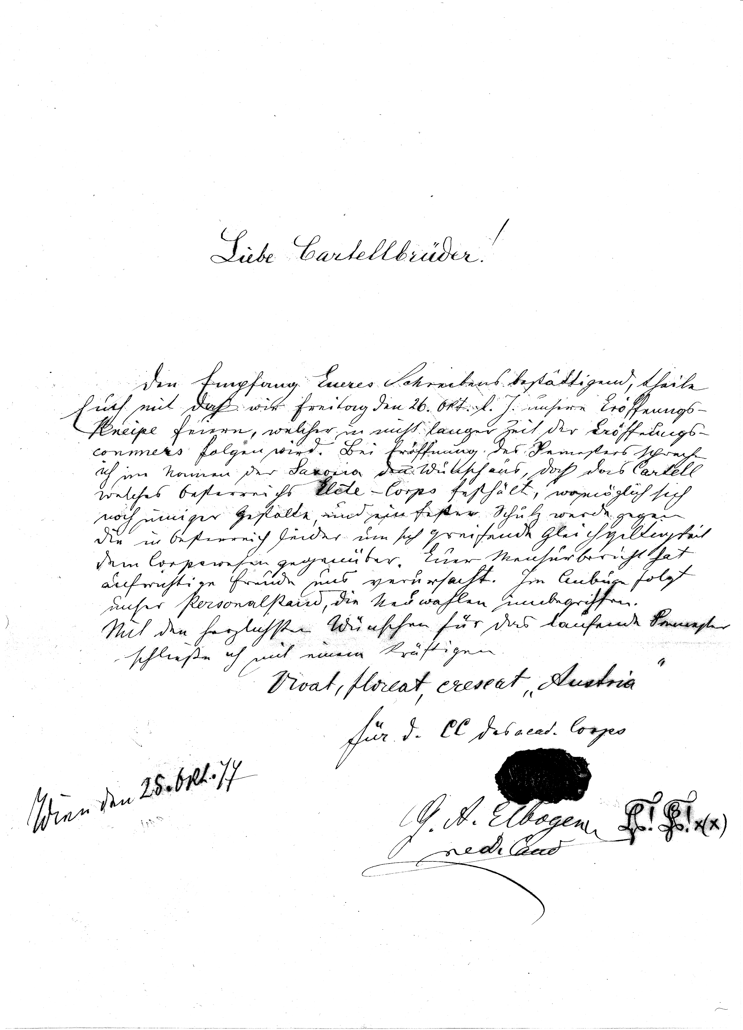 Einladungsschreiben des Corps Saxonia Wien an das Corps Austria in Prag